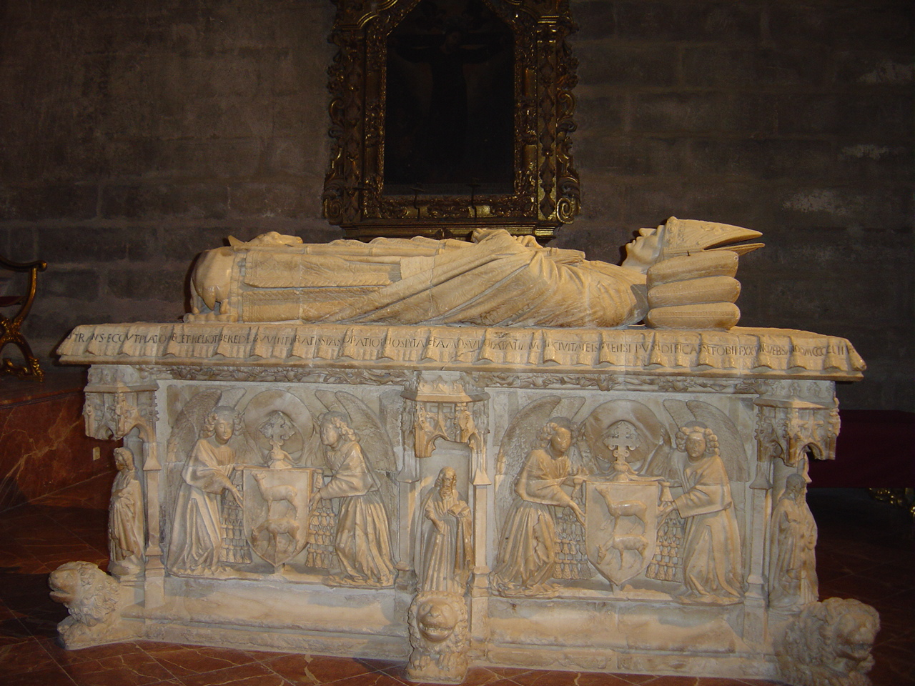 Sepulcro del cardenal Juan de Cervantes (1382-1453), en el interior de la capilla de San Hermenegildo de la catedral de Sevilla, (España).